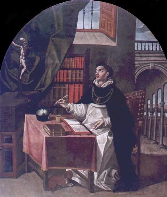 La obra representa al célebre teólogo dominico Santo Tomás de Aquino († 1274).